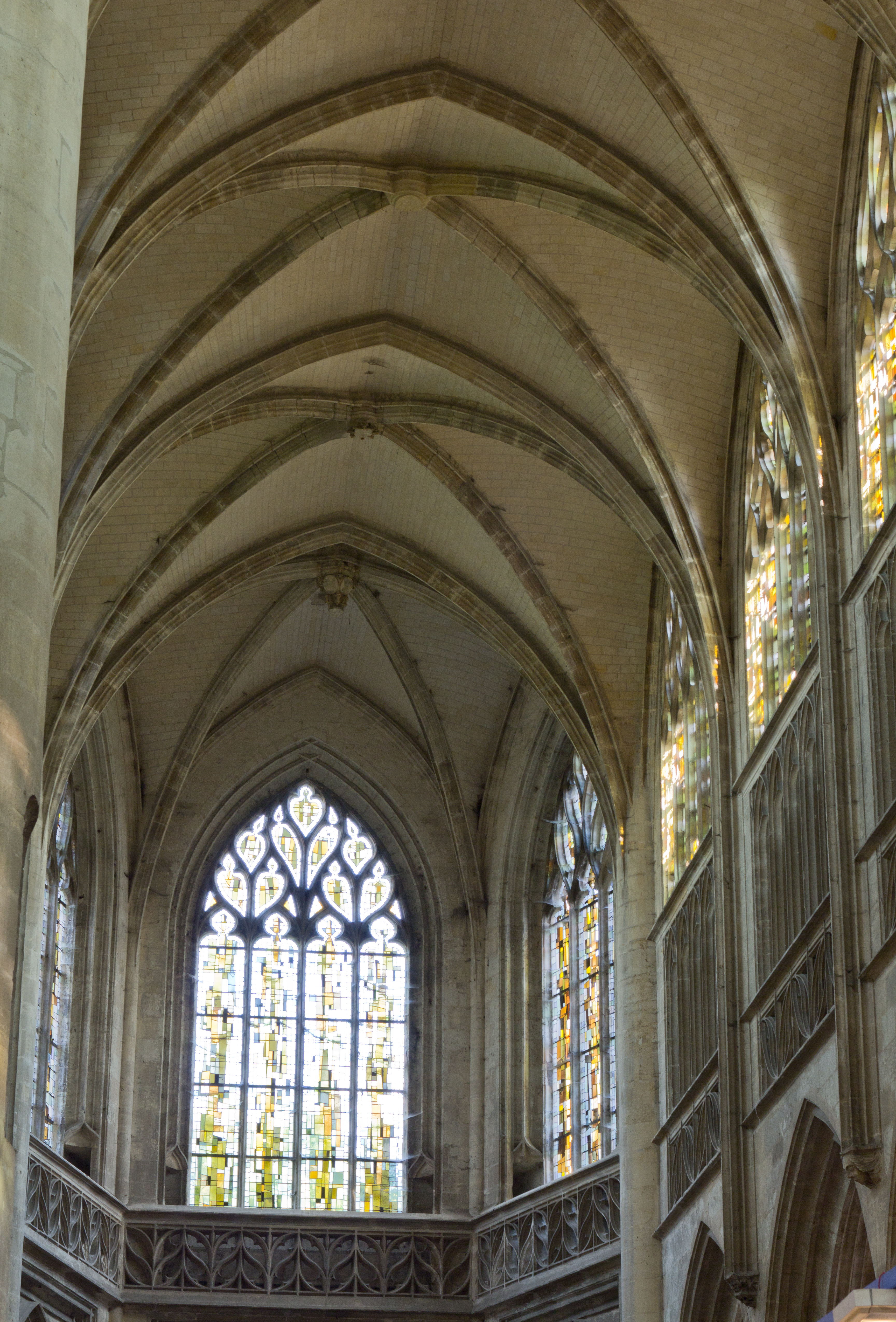 Voutes et vitraux de l'église Saint-Jacques de Lisieux. .